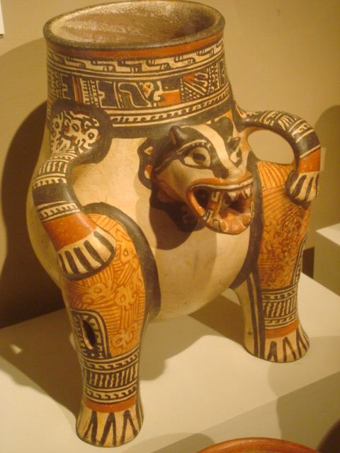 Vasija zoomorfa de cerámica policromada de Nicoya, estilo Pataky. 1000-1350 d.C. Museo del Jade. Costa Rica.